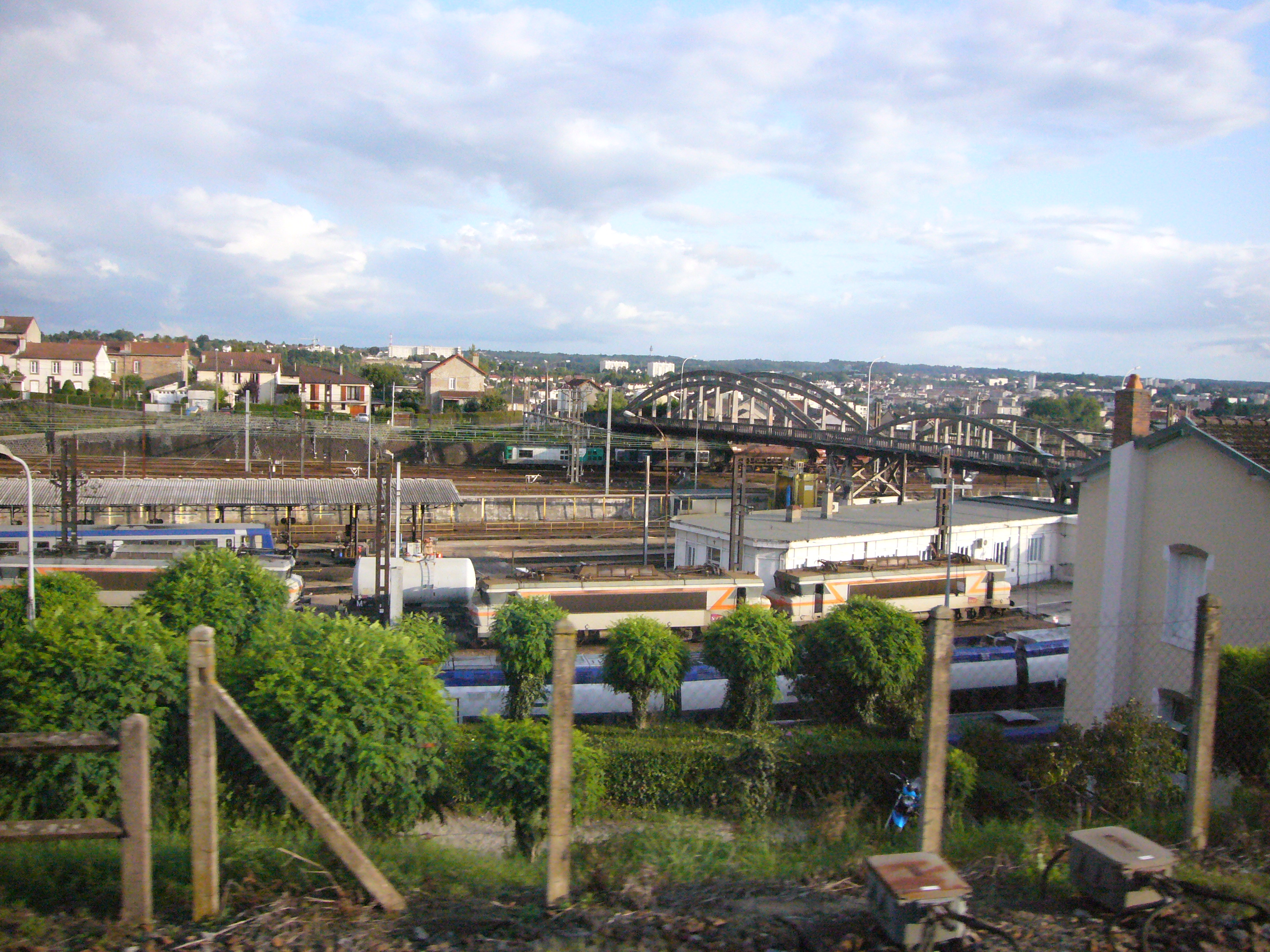 Aperçu de la passerelle Montplaisir et du bas des voies de la gare de triage du puy-Imbert, à Limoges (87, France), sur la ligne en direction de Paris. Cette photo a été prise depuis un TER en direction d'Angoulême, la voie Limoges-Angoulême empruntant d'abord les voies vers Paris (nord-est) avant de faire un virage à 360° et de repartir en sens inverse (sud-ouest) de nouveau vers la Gare des Bénédictins, puis avant celle-ci vers l'ouest et la Gare Montjovis.